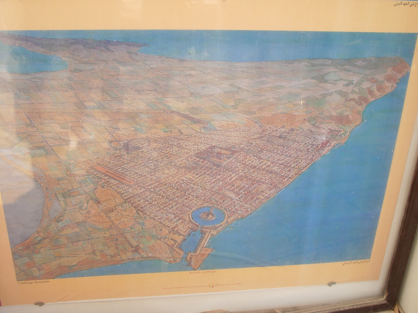 reconstrucció del port púnic